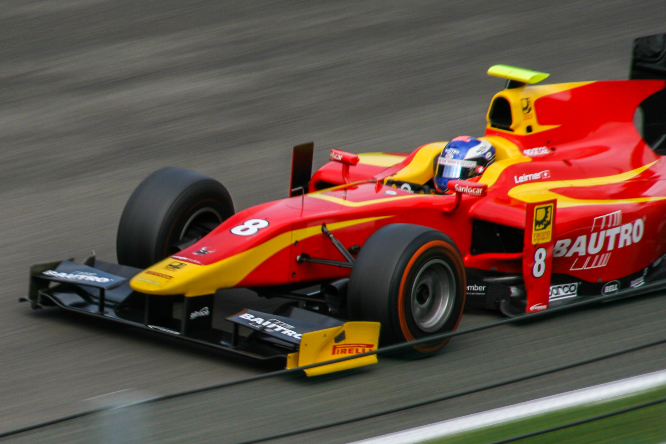 Fabio Leimer beim Sprintrennen der GP2-Serie in Spa-Francorchamps 2013